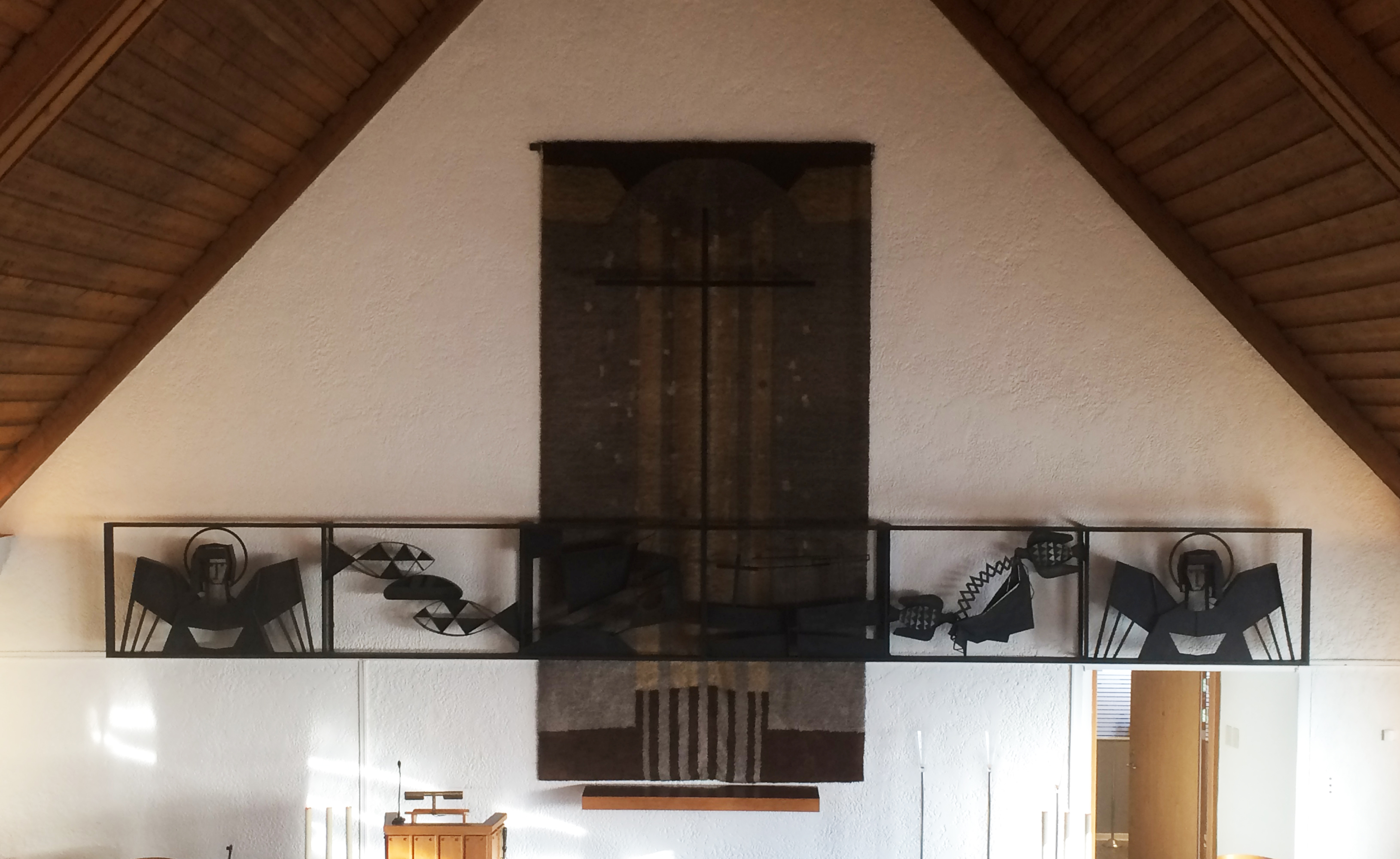 Interiør, Lademoen kapell, Trondheim. Alterutsmykning: Ramon Isern